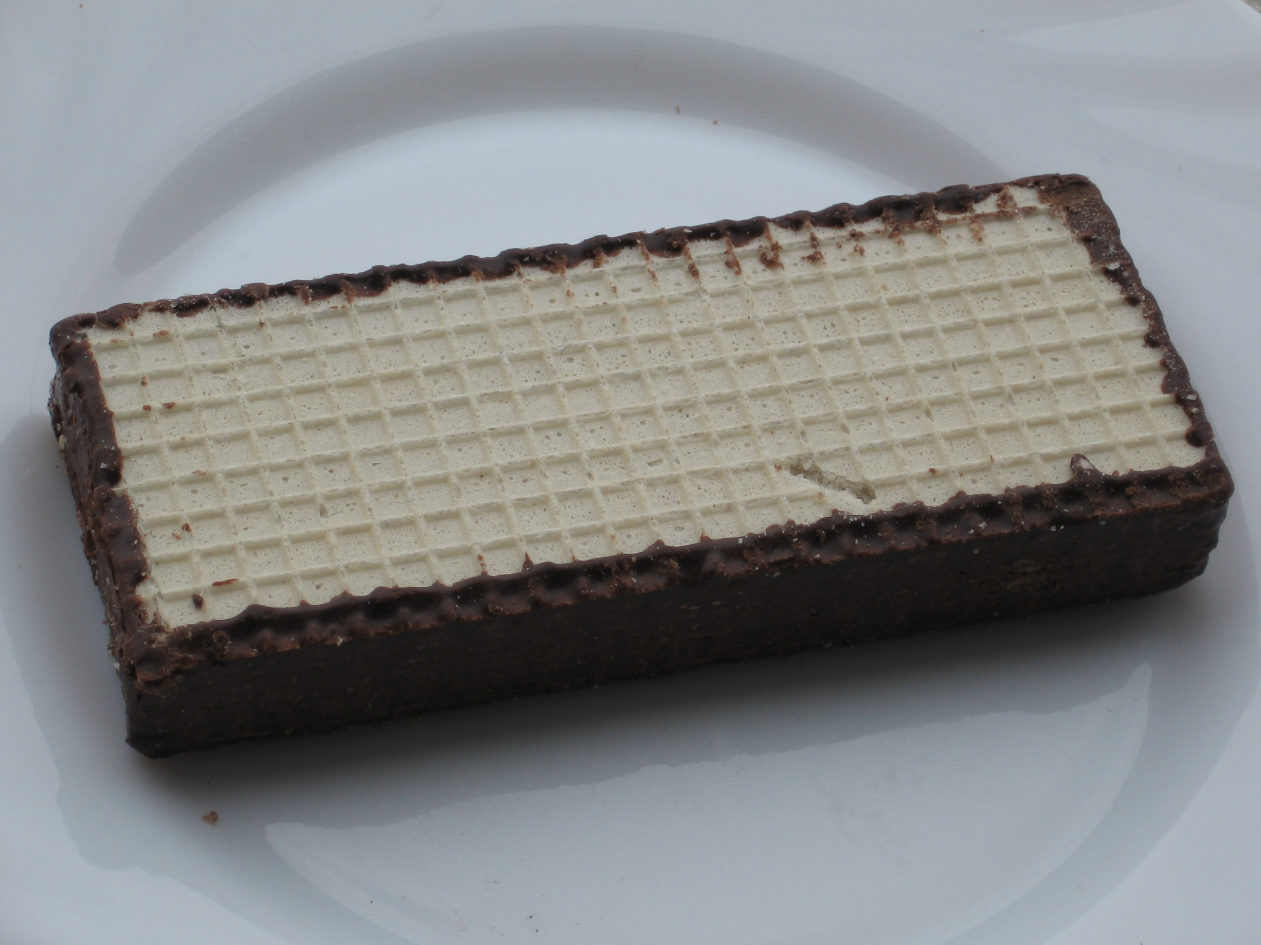 Czech waffle "Tatranky"